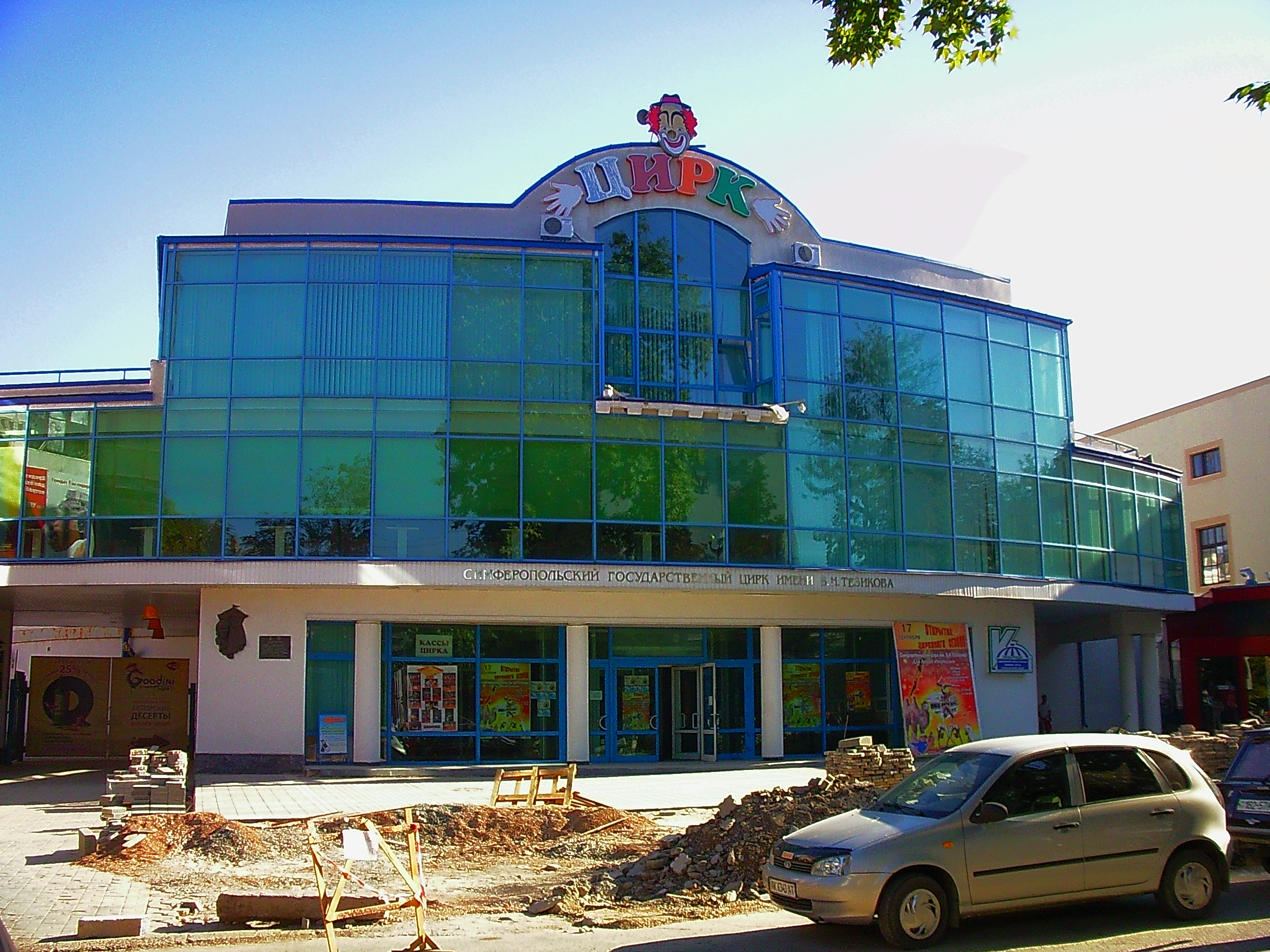 Цирк